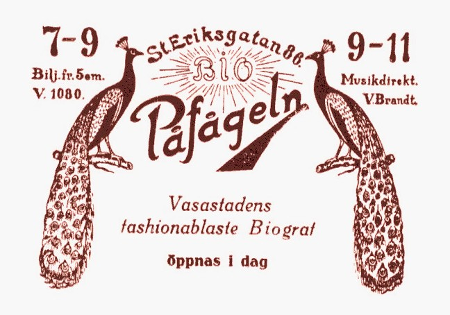 Tidningsannons för biograf "Påfågeln"